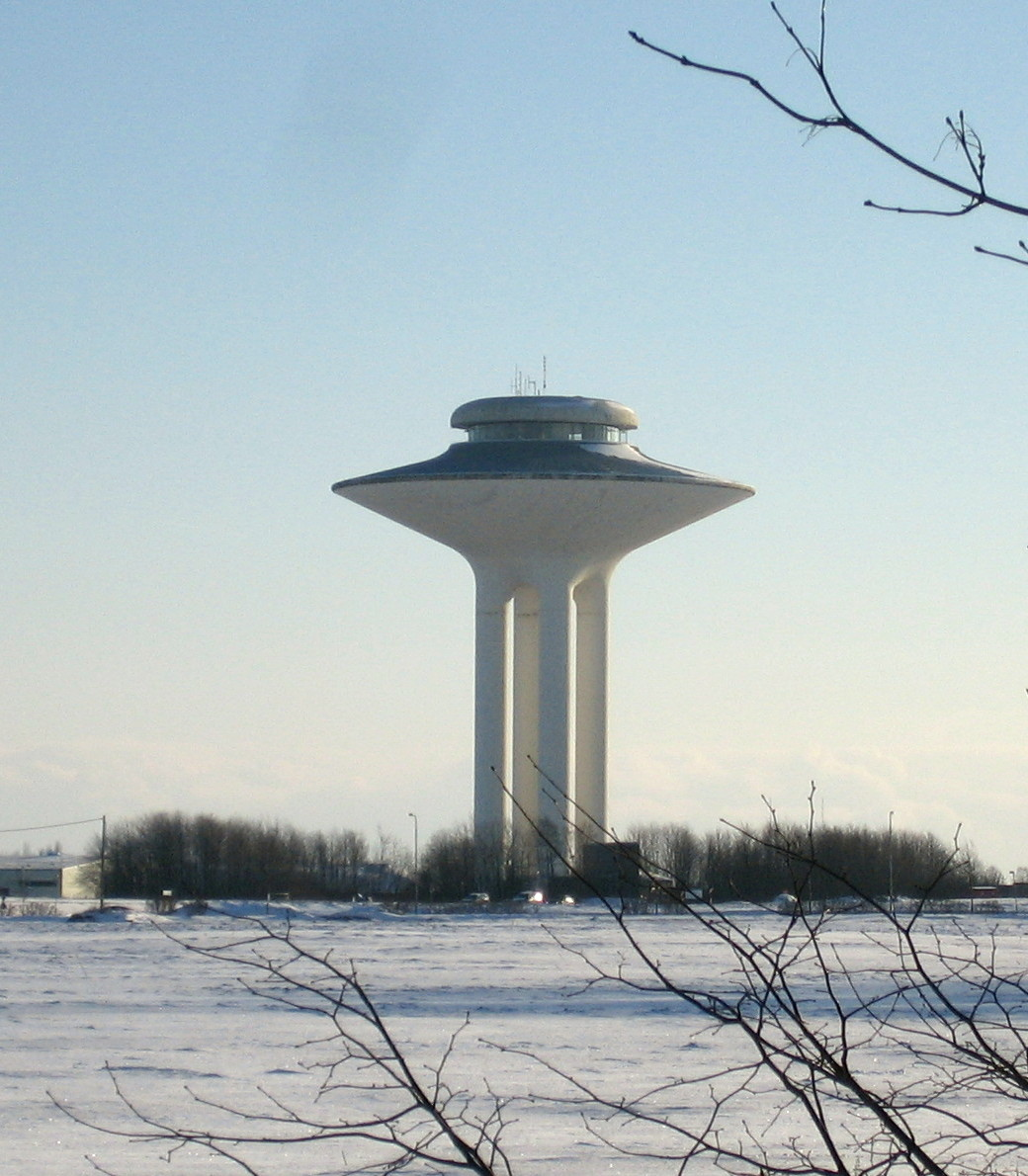 Hyllie water tower in Malmö, Sweden.